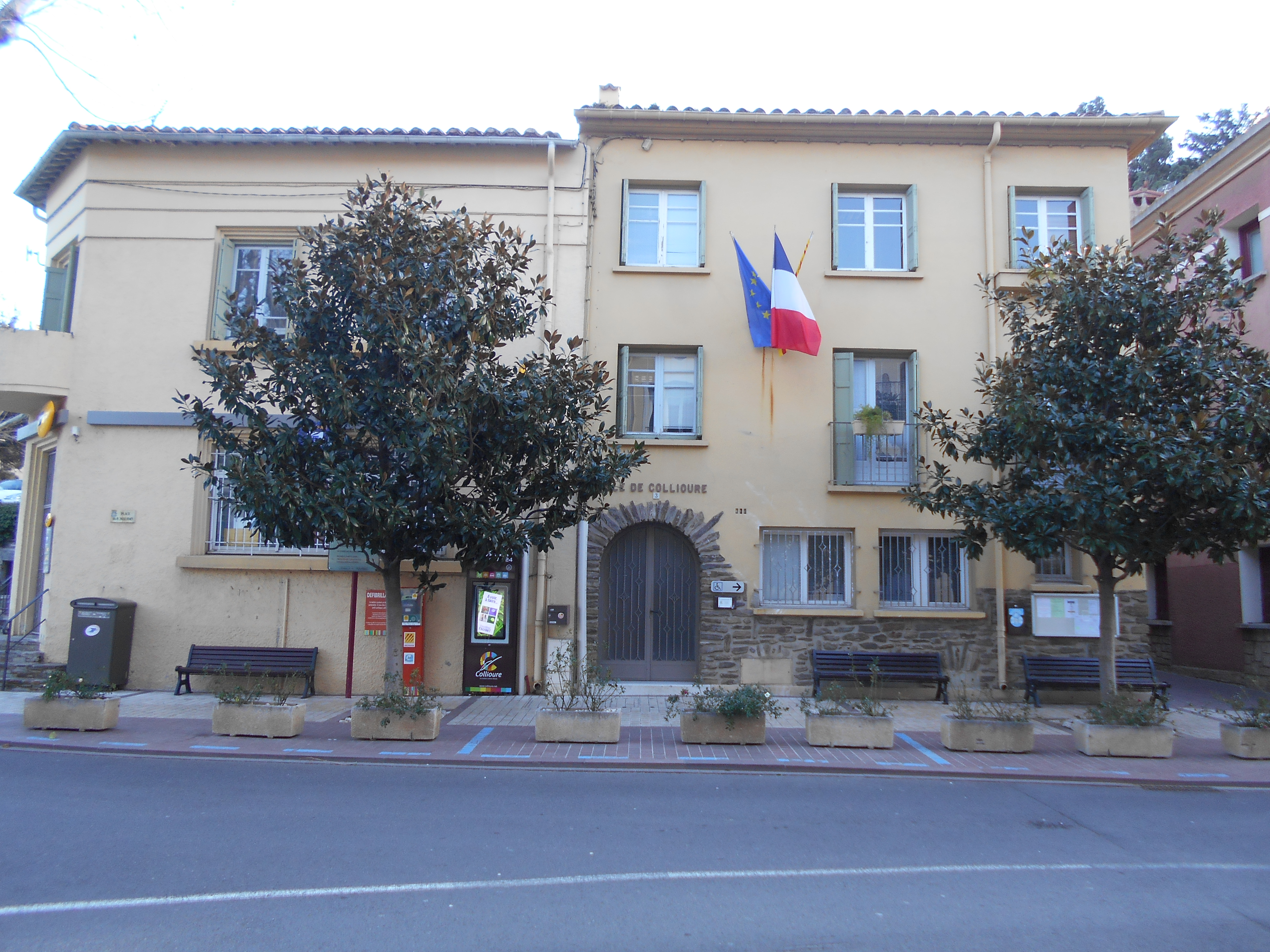 Casa del Comú de Cotlliure